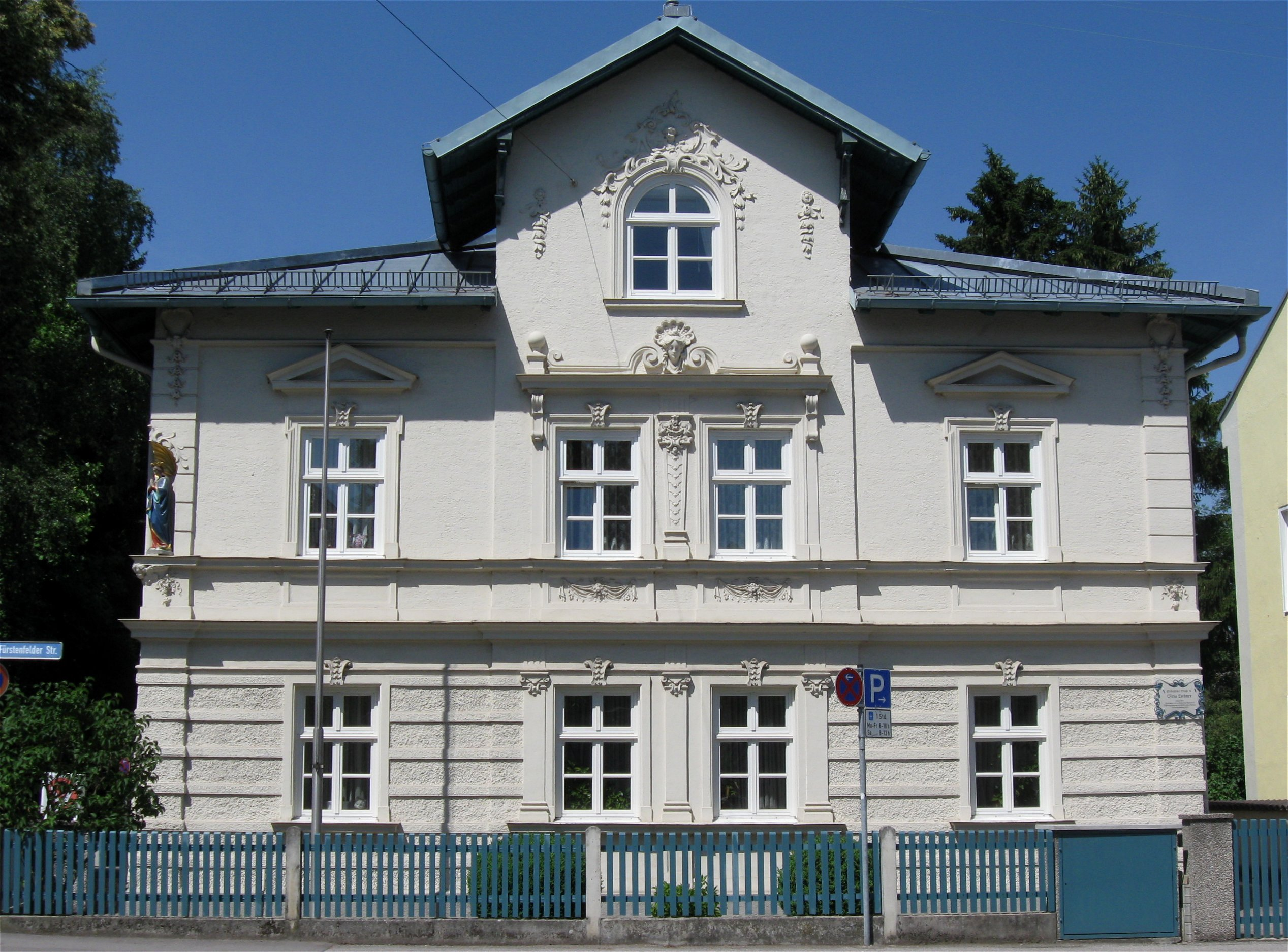 Fürstenfelder Straße 16. Wohnhaus mit vorstehendem Walmdach, Zwerchhaus und Fassadengliederung in historisierenden Formen, um 1870.